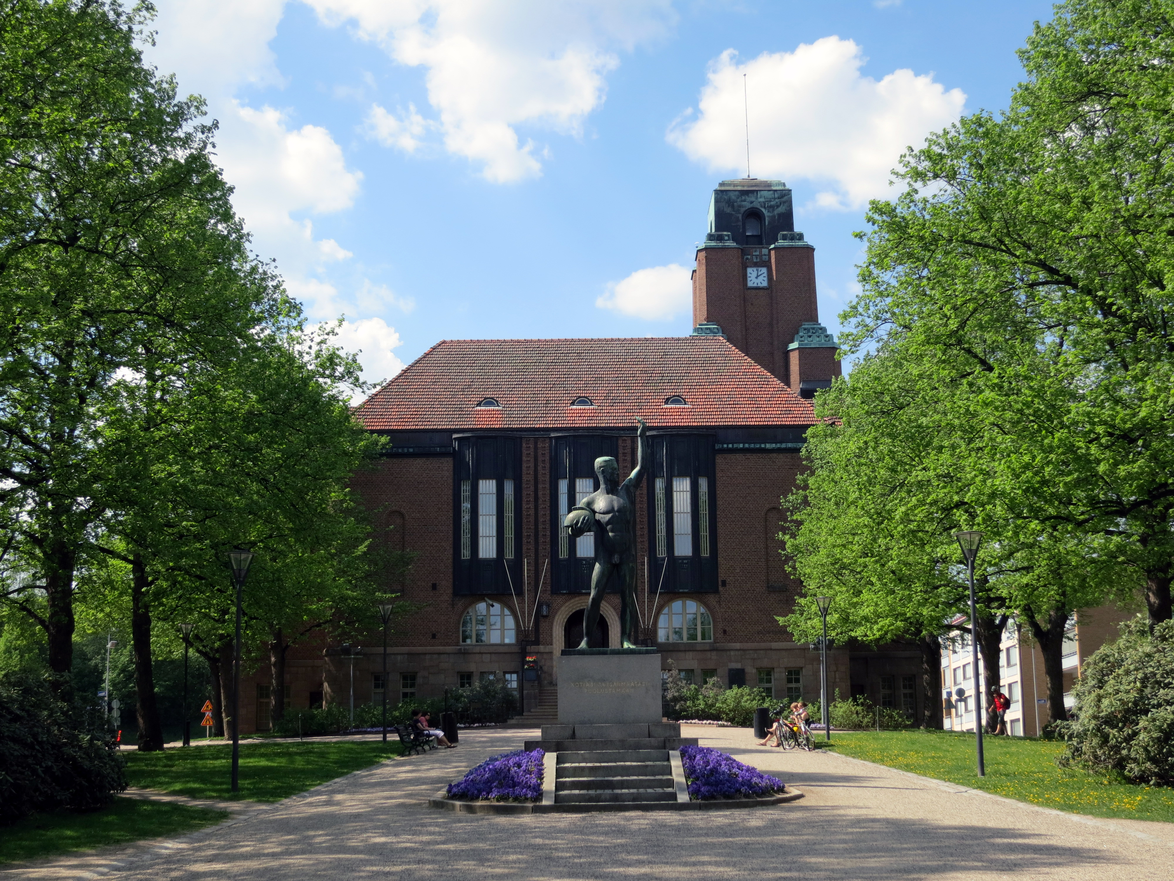 Lahden kaupungintalo kesällä. Kuvattu idästä kohti länteä.